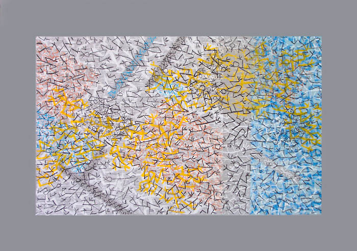 Jánosi Katalin (1951. november 2. -) magyar festő- és gobelinművész alkotása: Játékos_rajz, 2004, olajpasztell, 70x100 cm